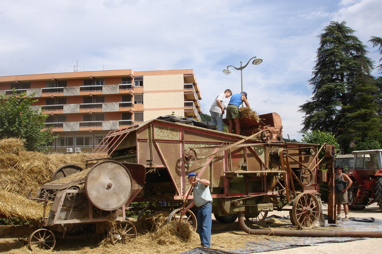 Coligny, foire à l'ancienne : démonstration du moissonneuse